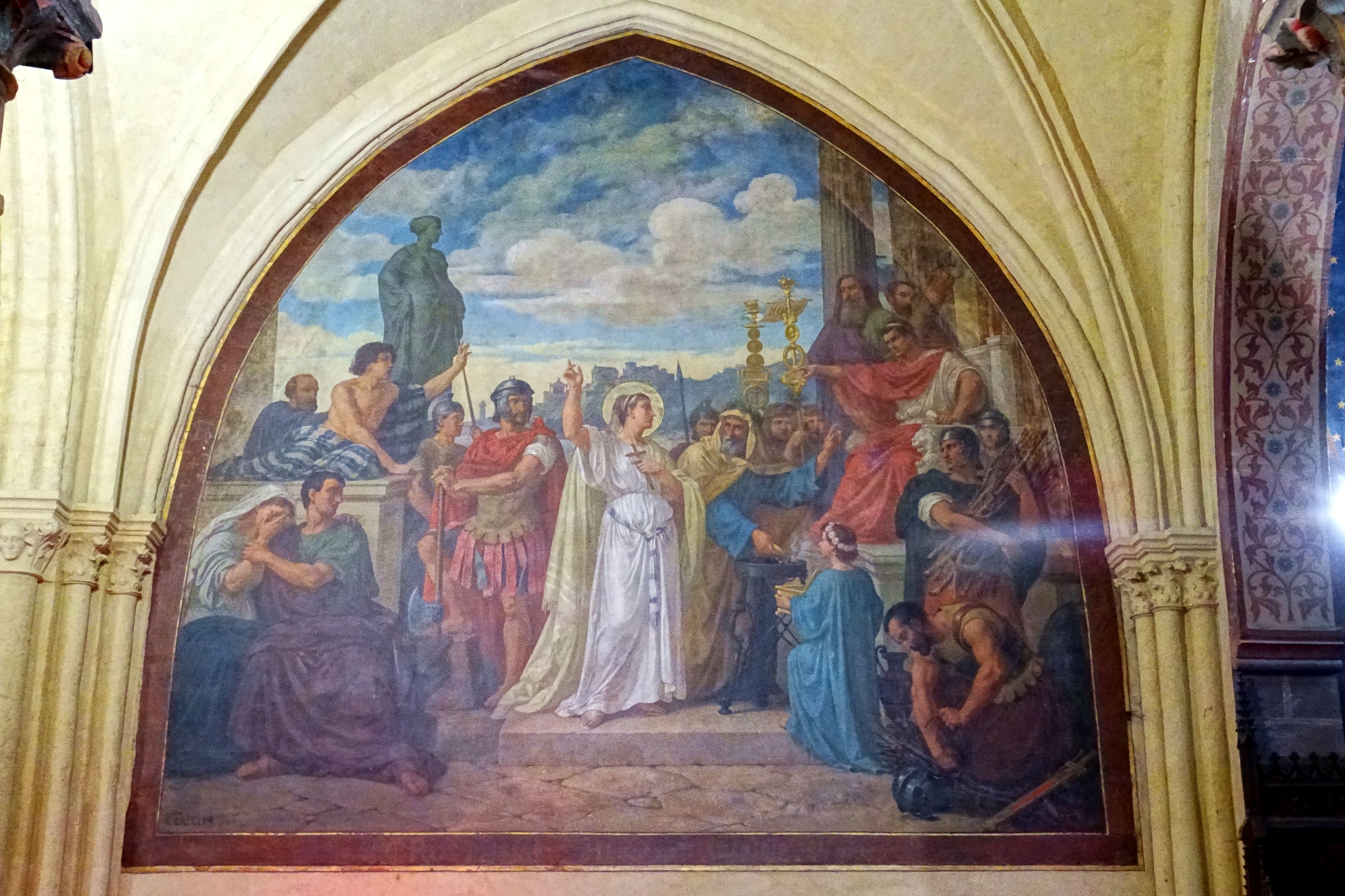 Chapelle latérale nord, 1ère travée, peinture monumentale - le martyr de sainte Honorine, par François Grellet, 1874.